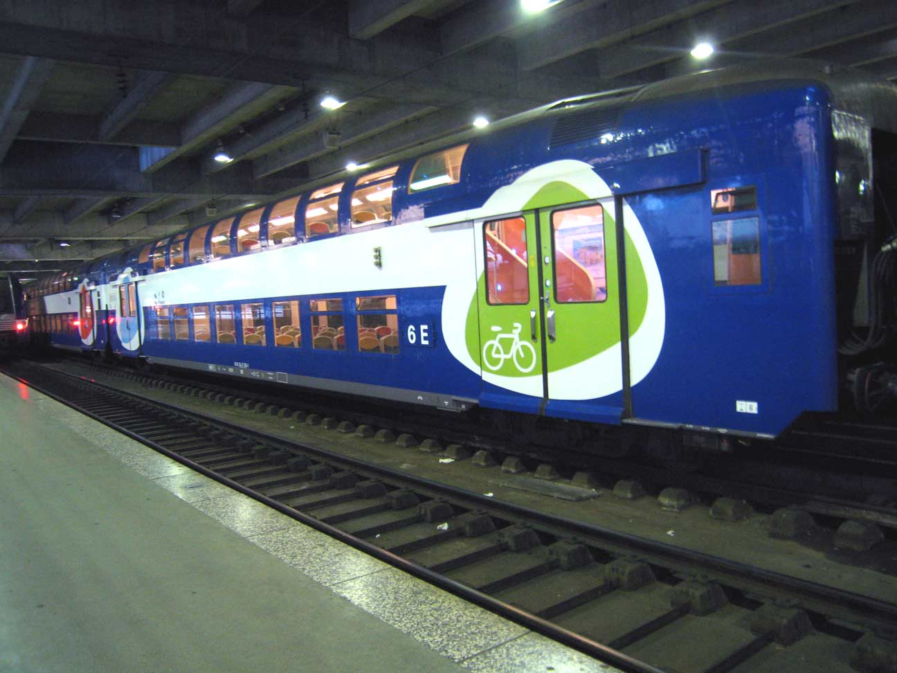 Habillage Transilien (rames desservant l'Ile de France) Lieu : Paris, France Date : Juin 2006 Auteur : Pline photo personnelle